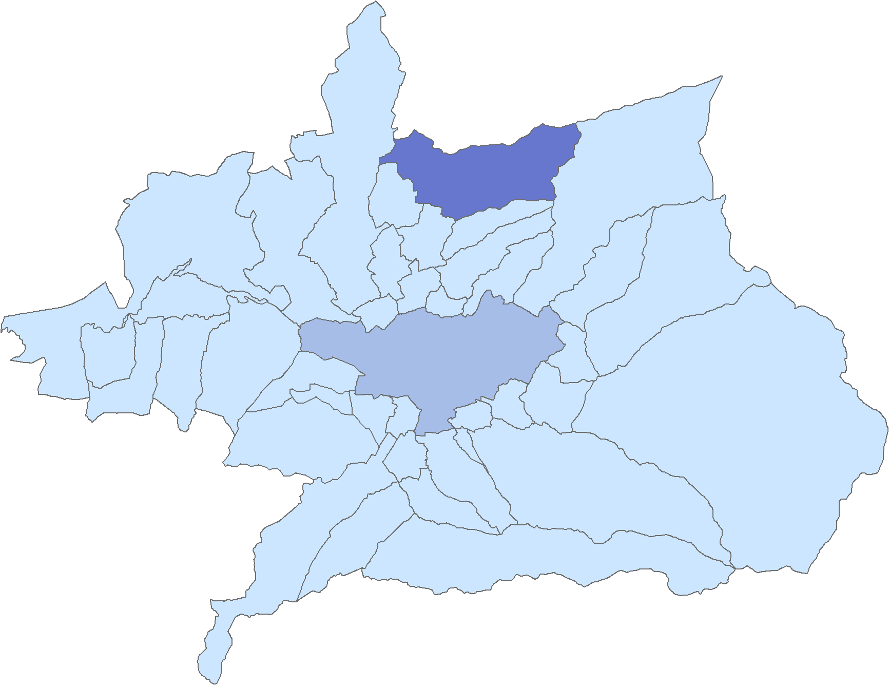 Situación del municipio de Cogollos Vega respecto a la comarca de la Vega de Granada, en España.